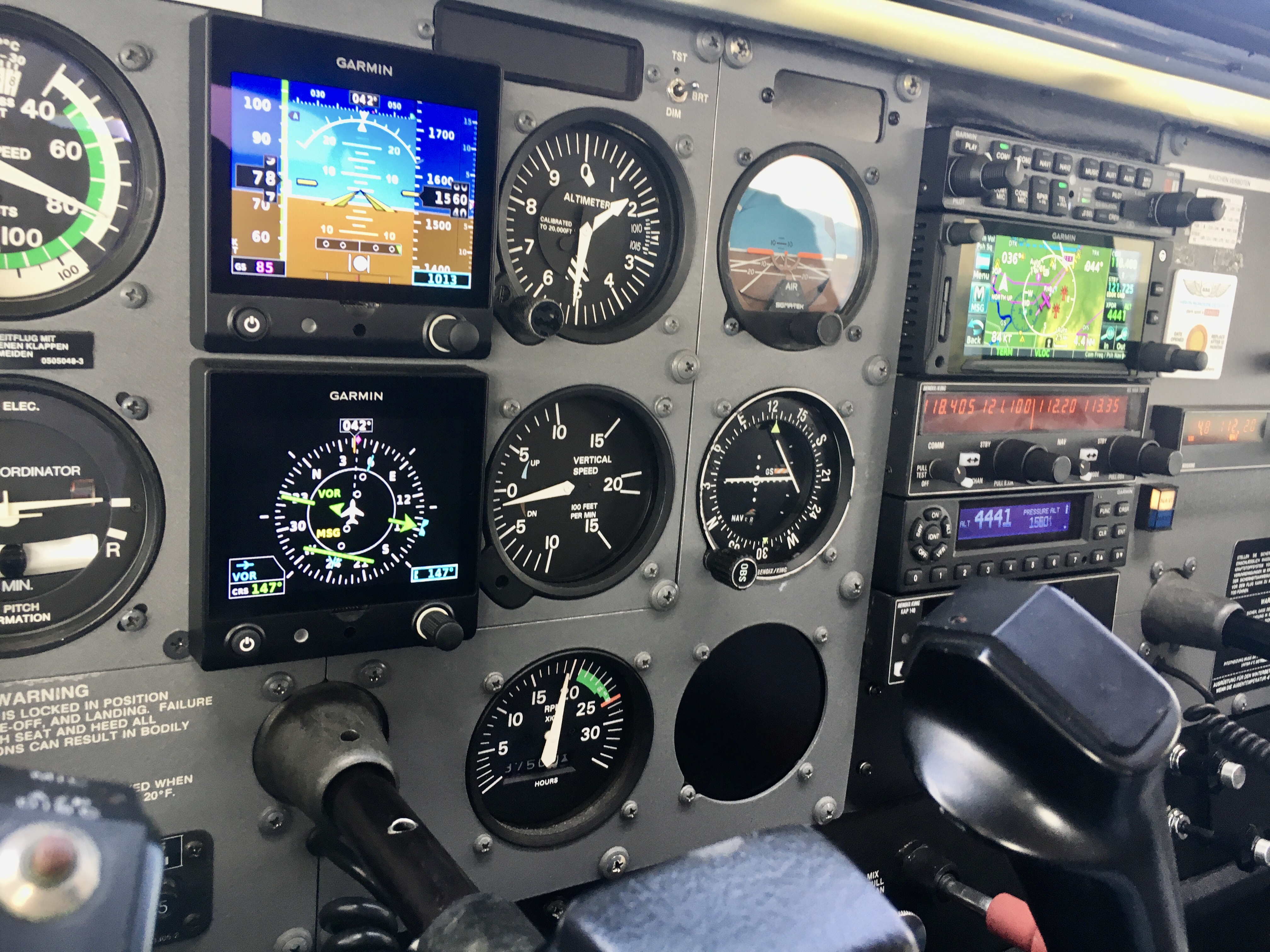 Retrofit Cockpit der D-EAWU, analoge Instrumente treffen auf moderne.